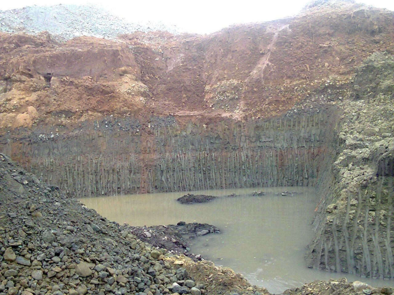 Minería ilegal y sus consecuencias